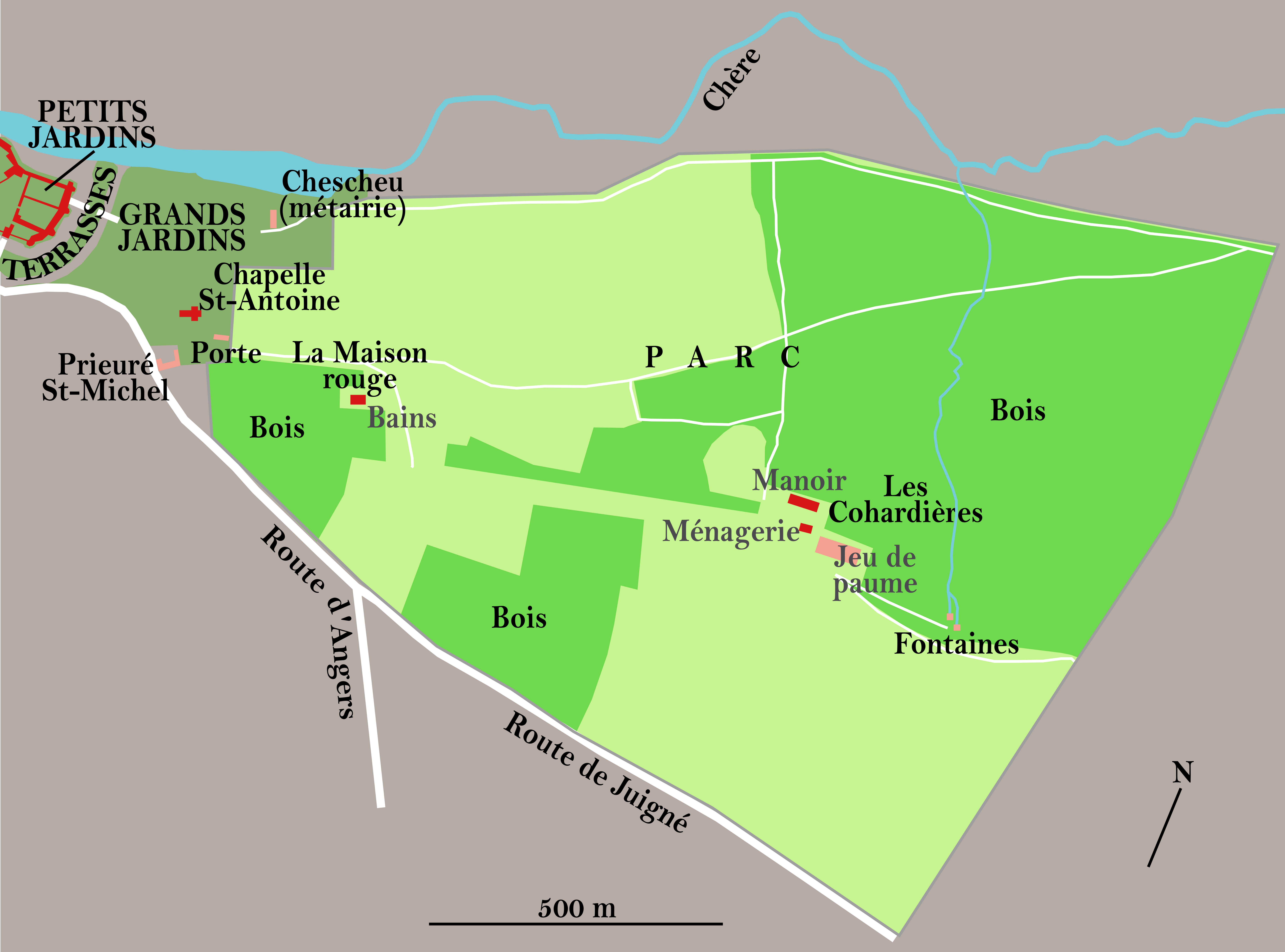 Plan du parc de Châteaubriant au milieu du XVIème siècle.